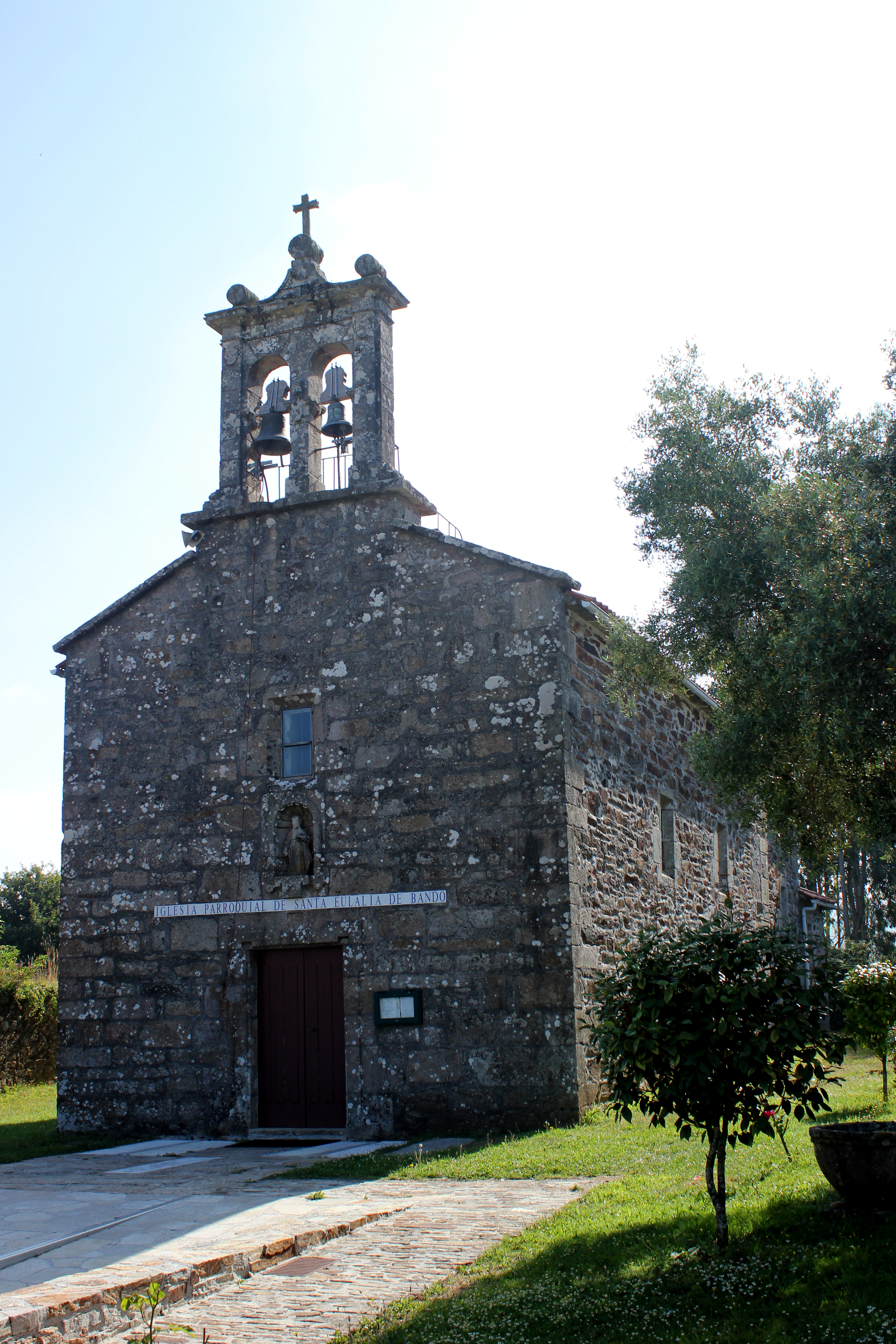 Igrexa de Bando, Santiago de Compostela.